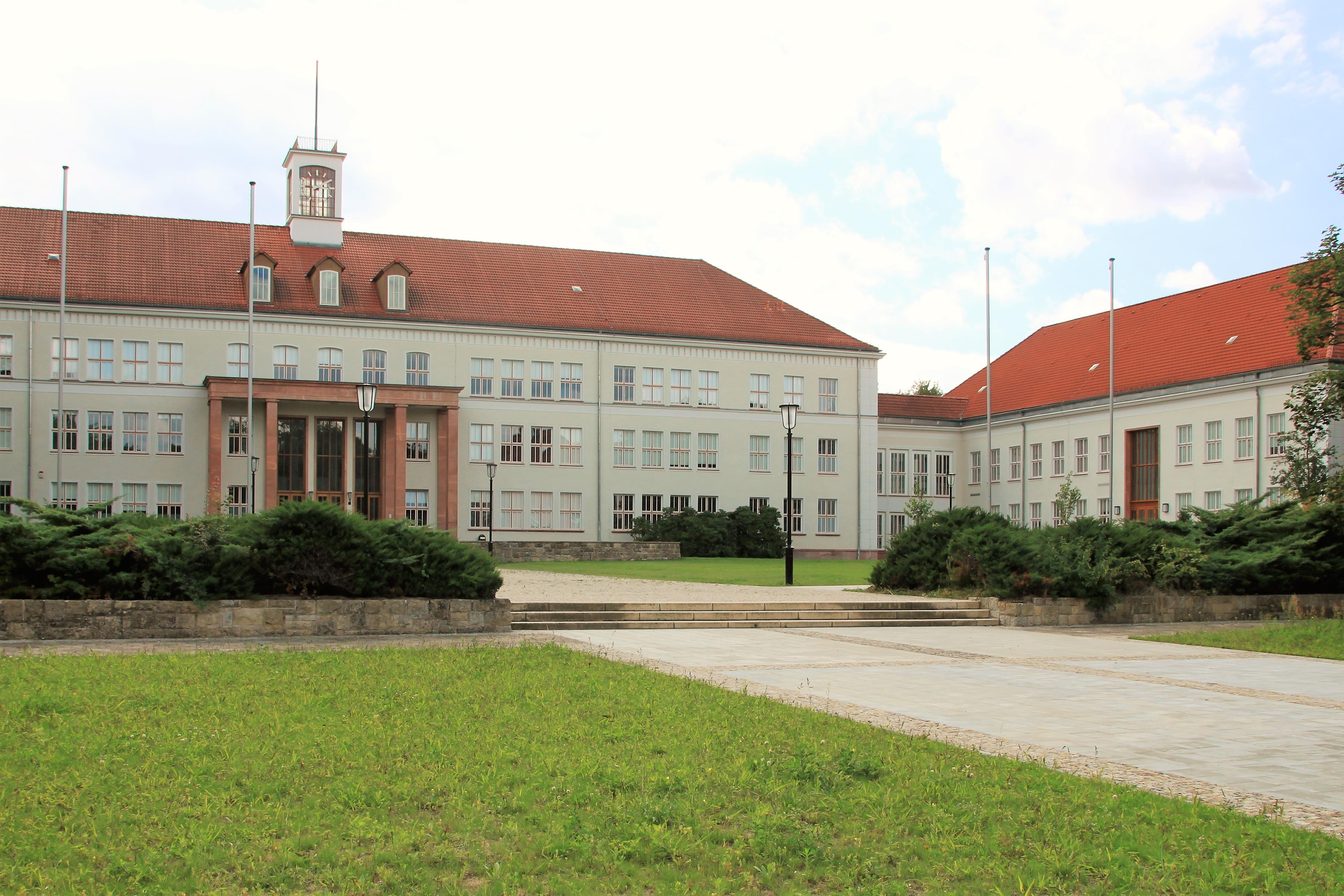 Schule in der Maxim-Gorki-Strasse, ehem. 3. POS "Wilhelm Pieck" / Oberschule III im III. Wohnkomplex